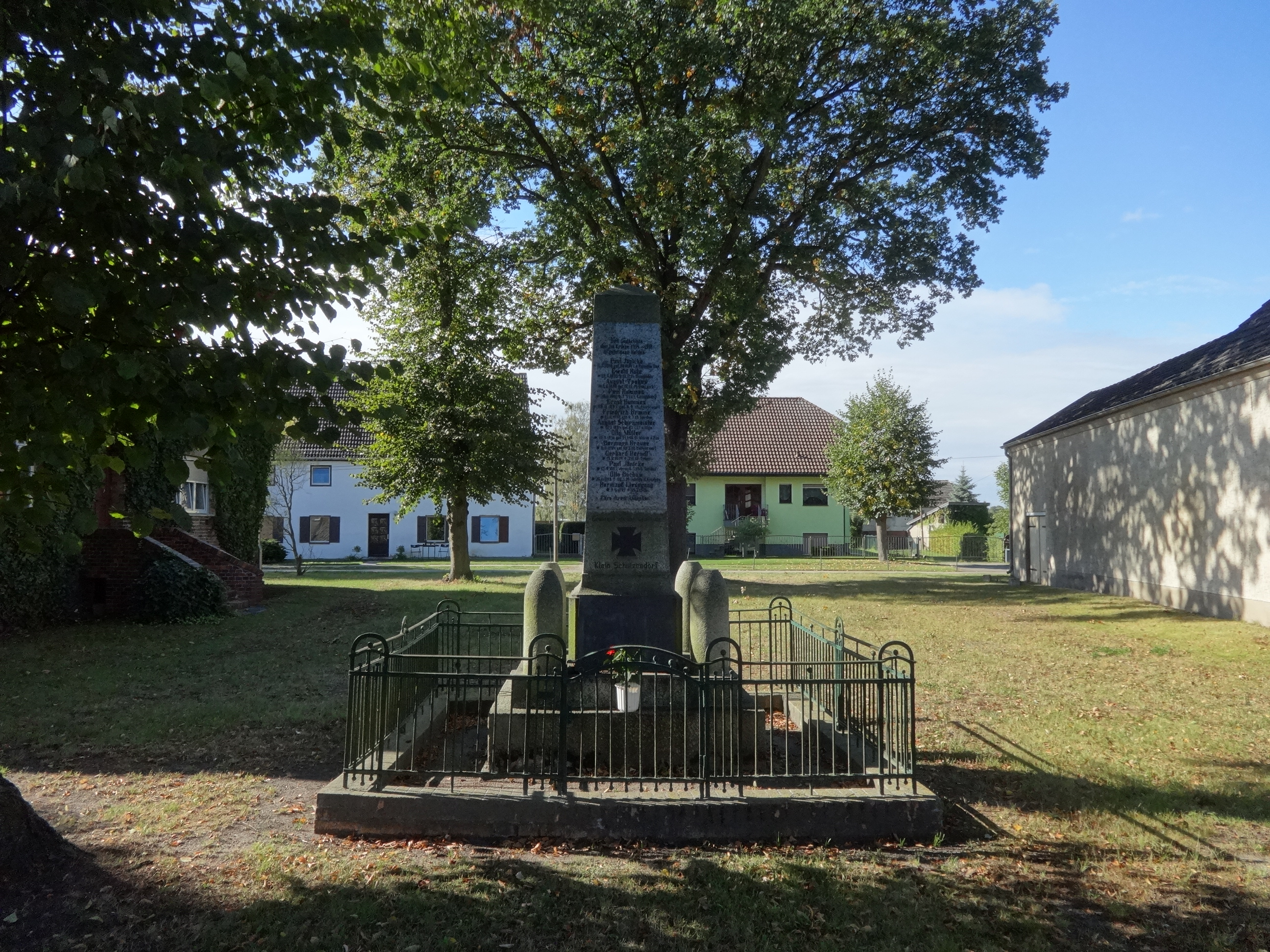 Klein Schulzendorf, ein Ortsteil der Stadt Trebbin im Landkreis Teltow-Fläming in Brandenburg